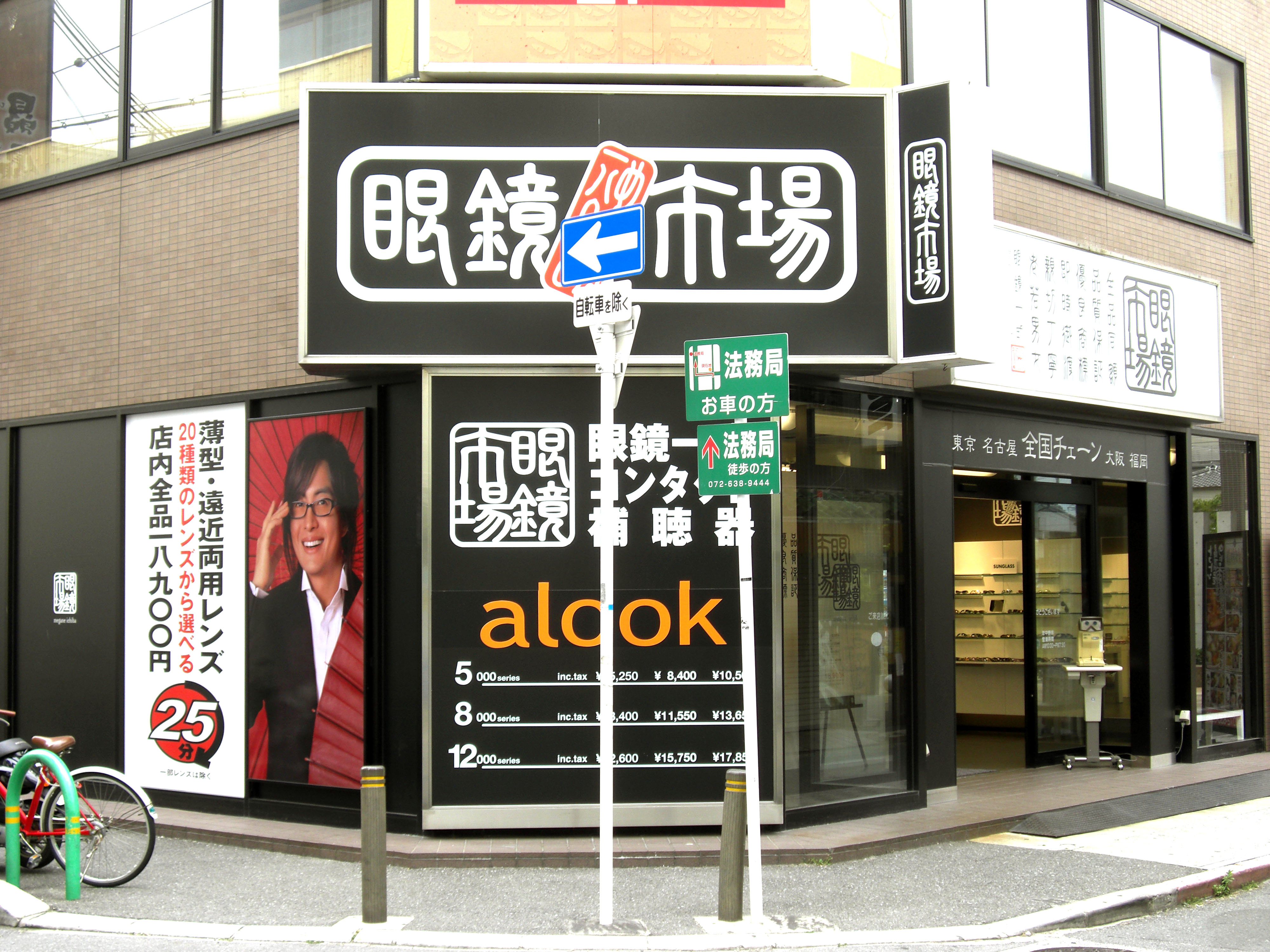 Meganeichiba_Ibarakihigashi,Nakatsucho Ibaraki-City Osaka Japan.